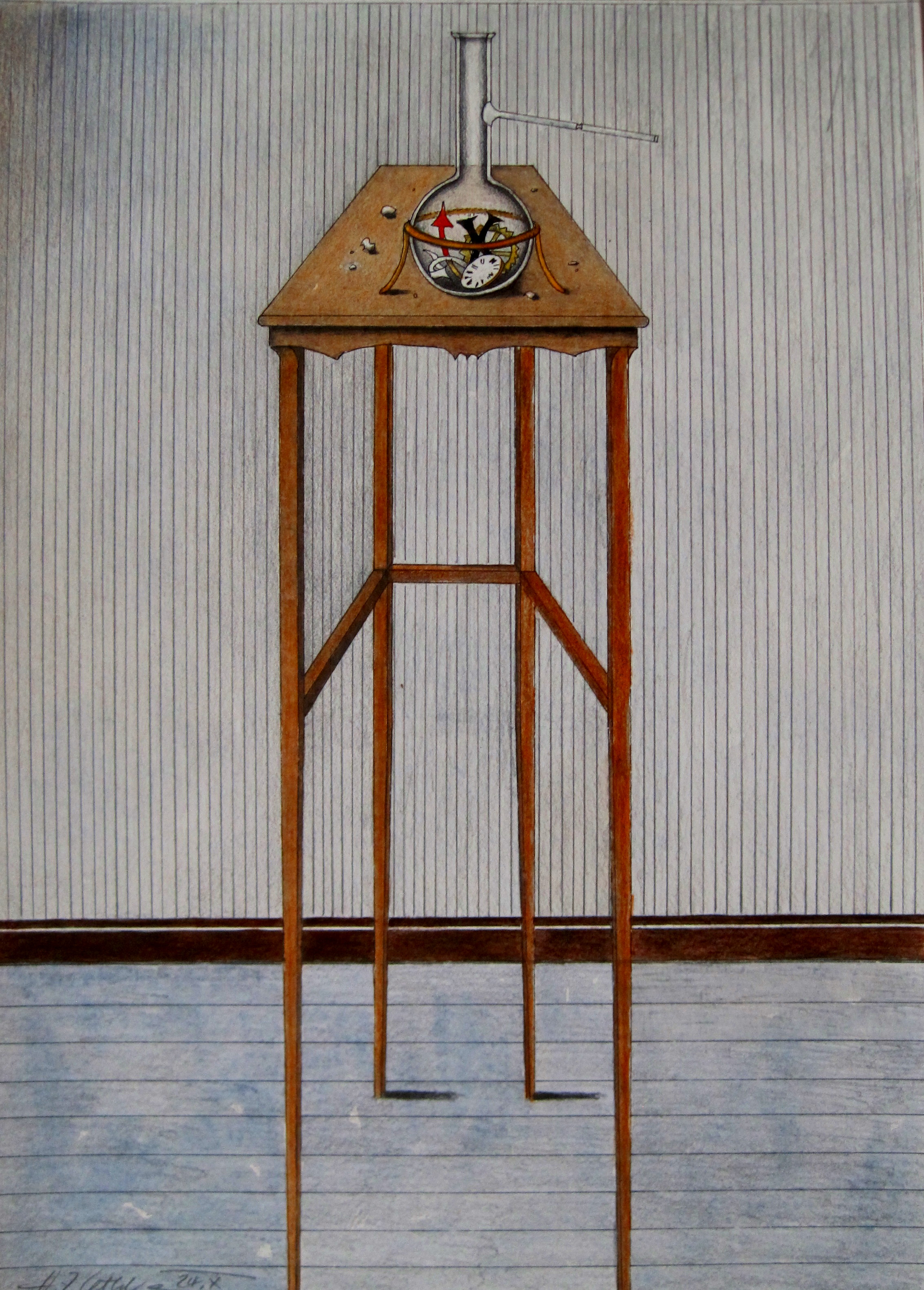 Im Labor der Zeit, 2018, Aquarell, Tusche, Farbstift